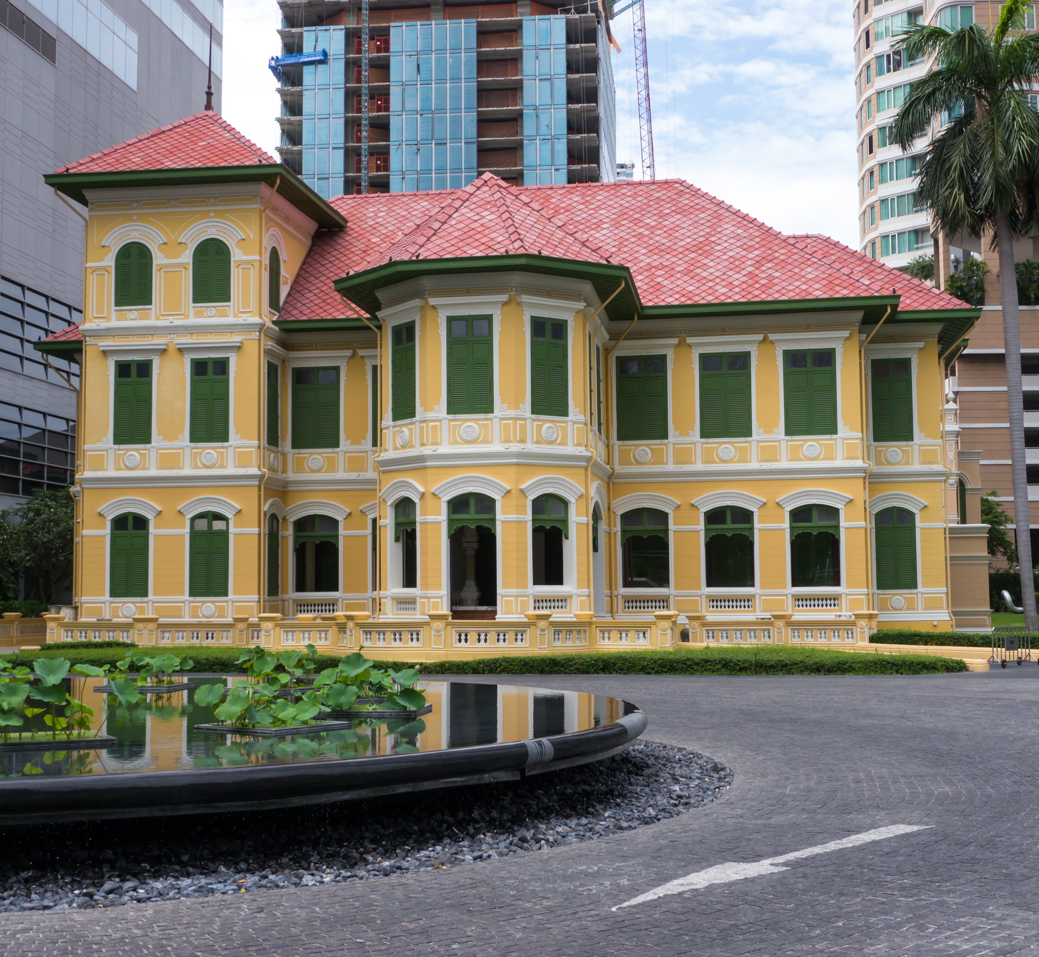 อาคารสถานทูตรัสเซีย (เดิม)